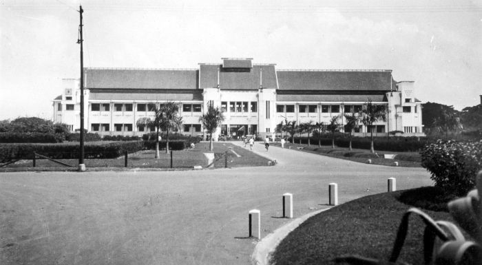 Repronegatief. Raadhuis te Soerabaia